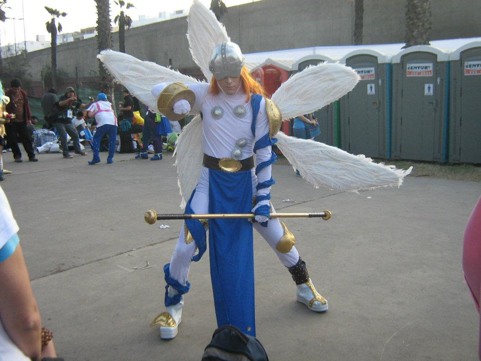 Cosplay Digimon, OtakufestPerú2011